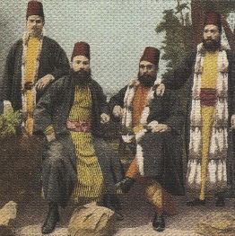 Osmanische Juden, drei mit Fehwamme-gefütterten Mänteln.